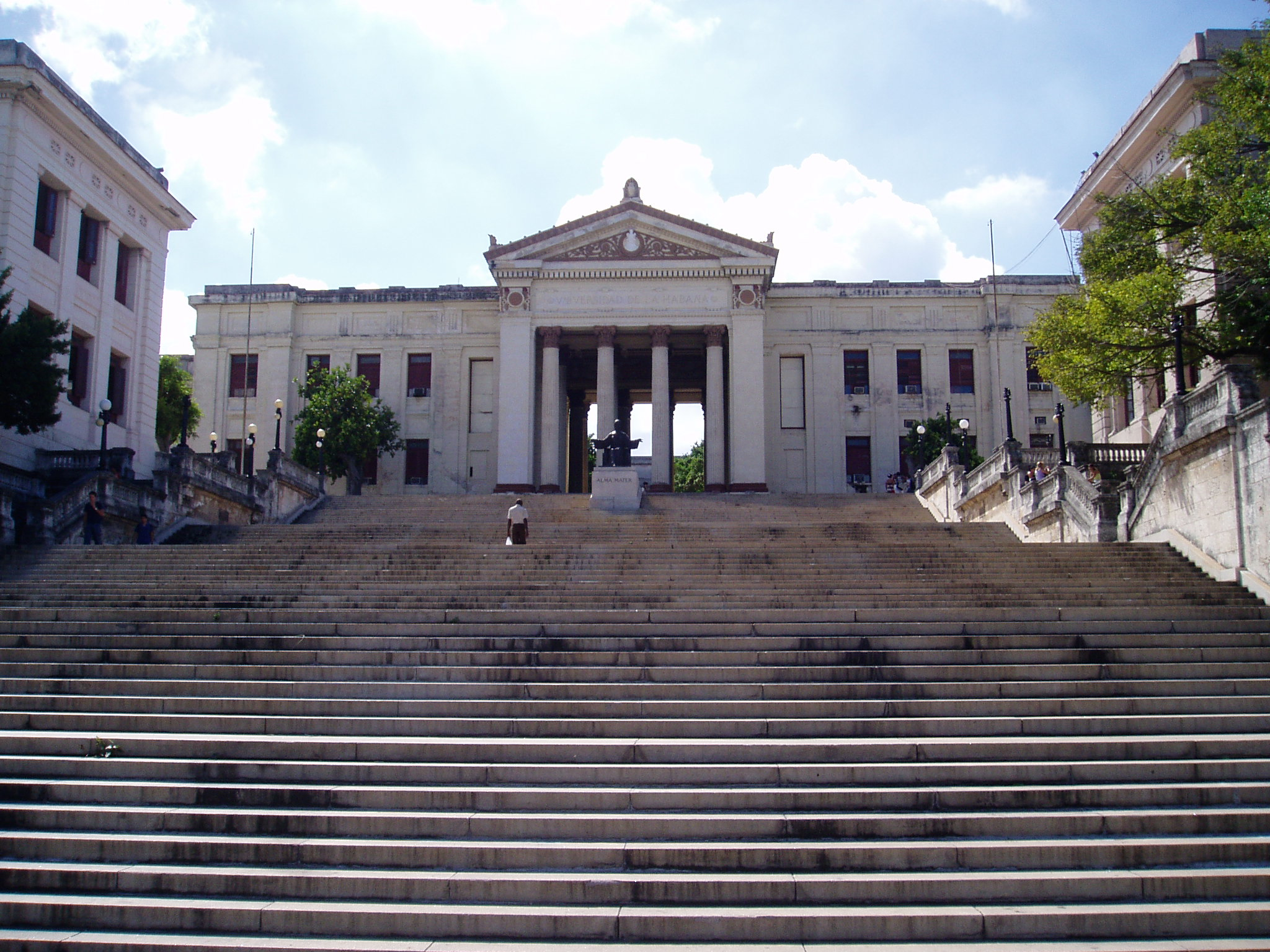 UH